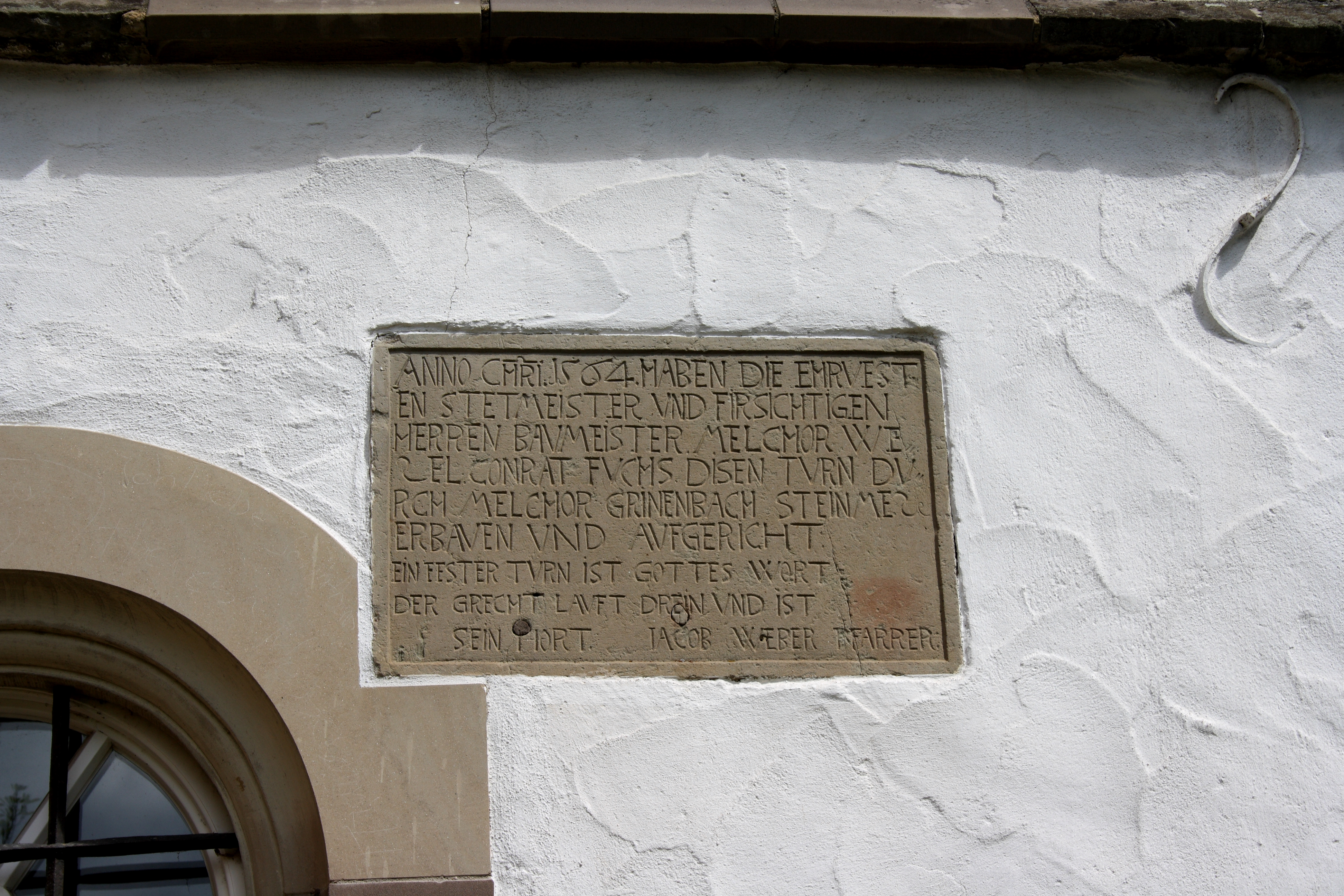 evangelische Kirche in Lorenzenzimmern, einem Stadtteil von Vellberg im Landkreis Schwäbisch Hall (Baden-Württemberg